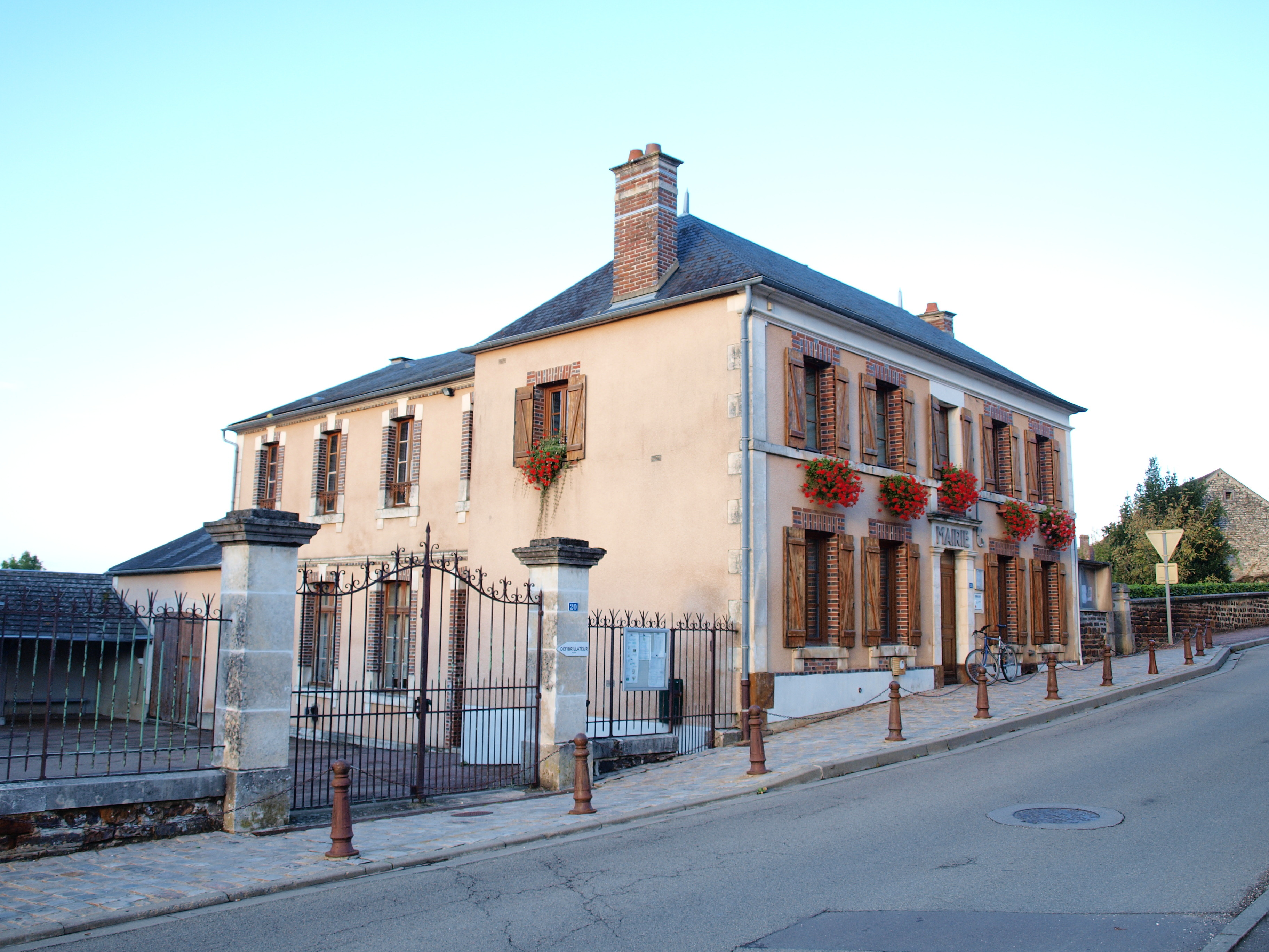 Lindry (Yonne, France) ; mairie